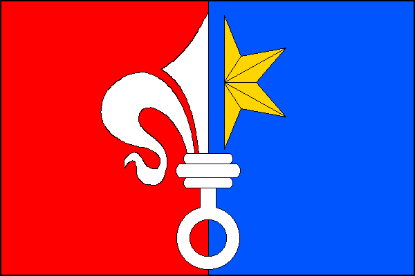 vlajka, Jiřice u Miroslavi, okres Znojmo